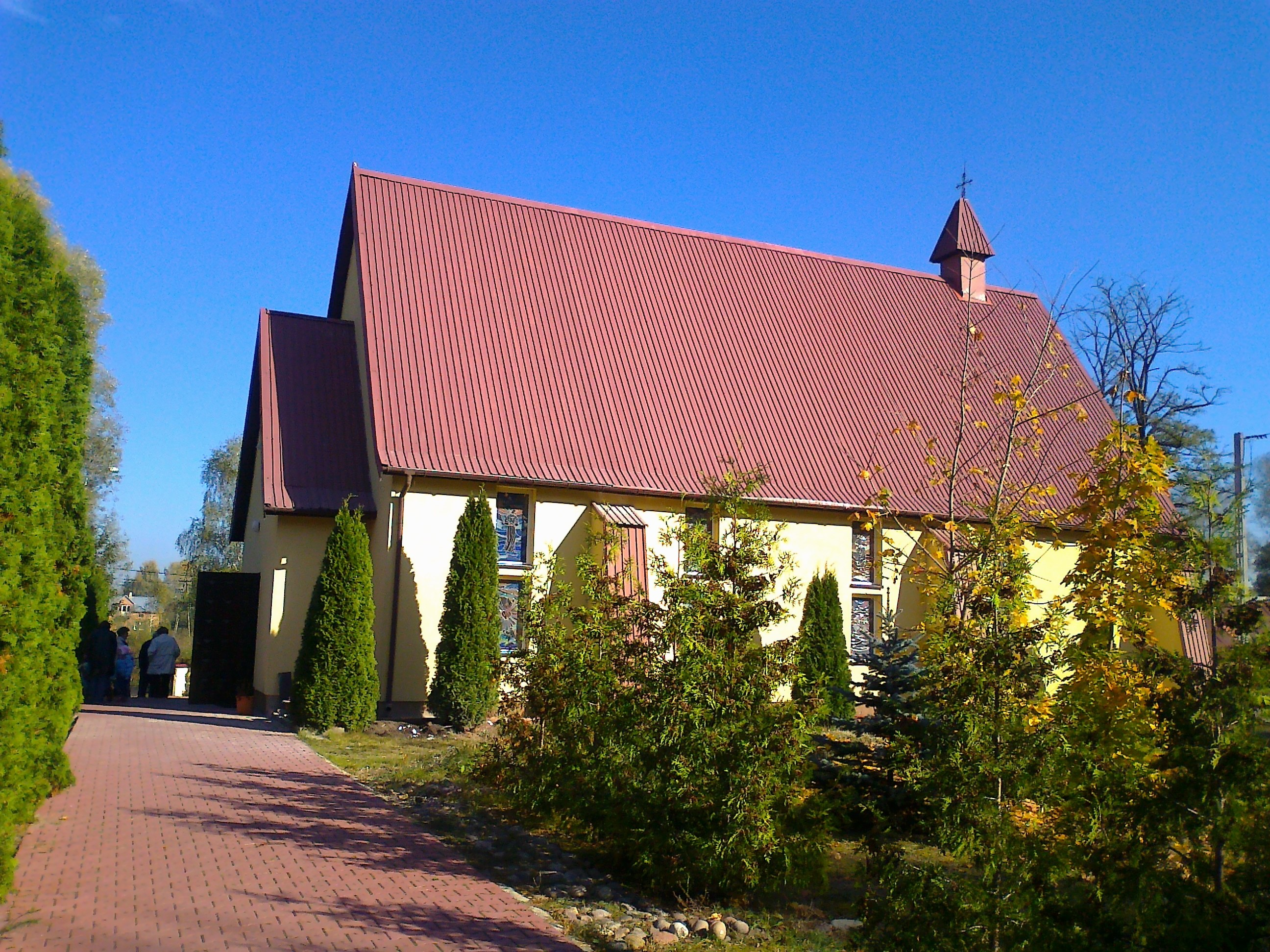 kościół MB Nieustającej Pomocy w Ryni (gm. Nieporęt, pow. legionowski)